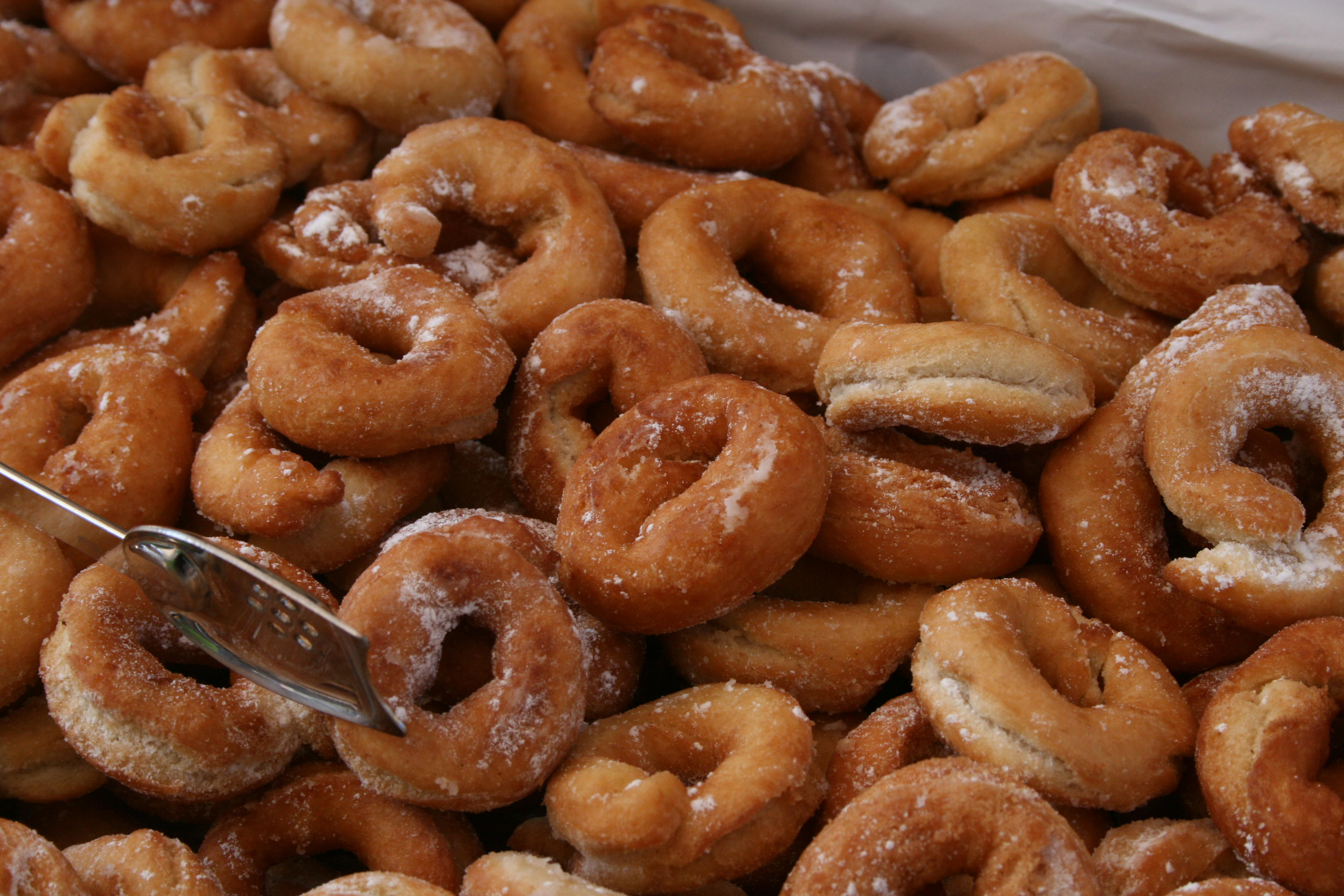 Rosquillas (Asturianas)